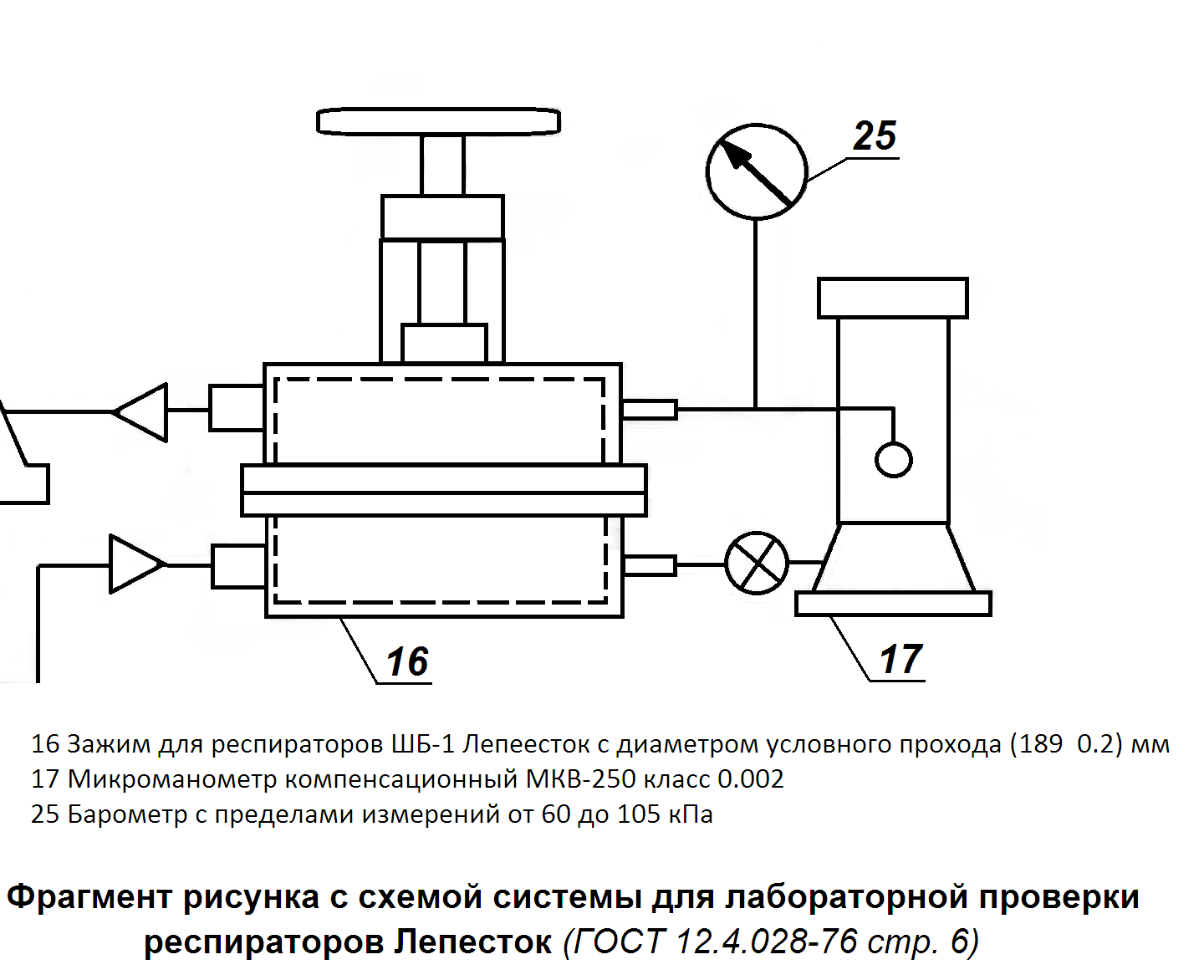 Фрагмент ГОСТ 12.4.028-76